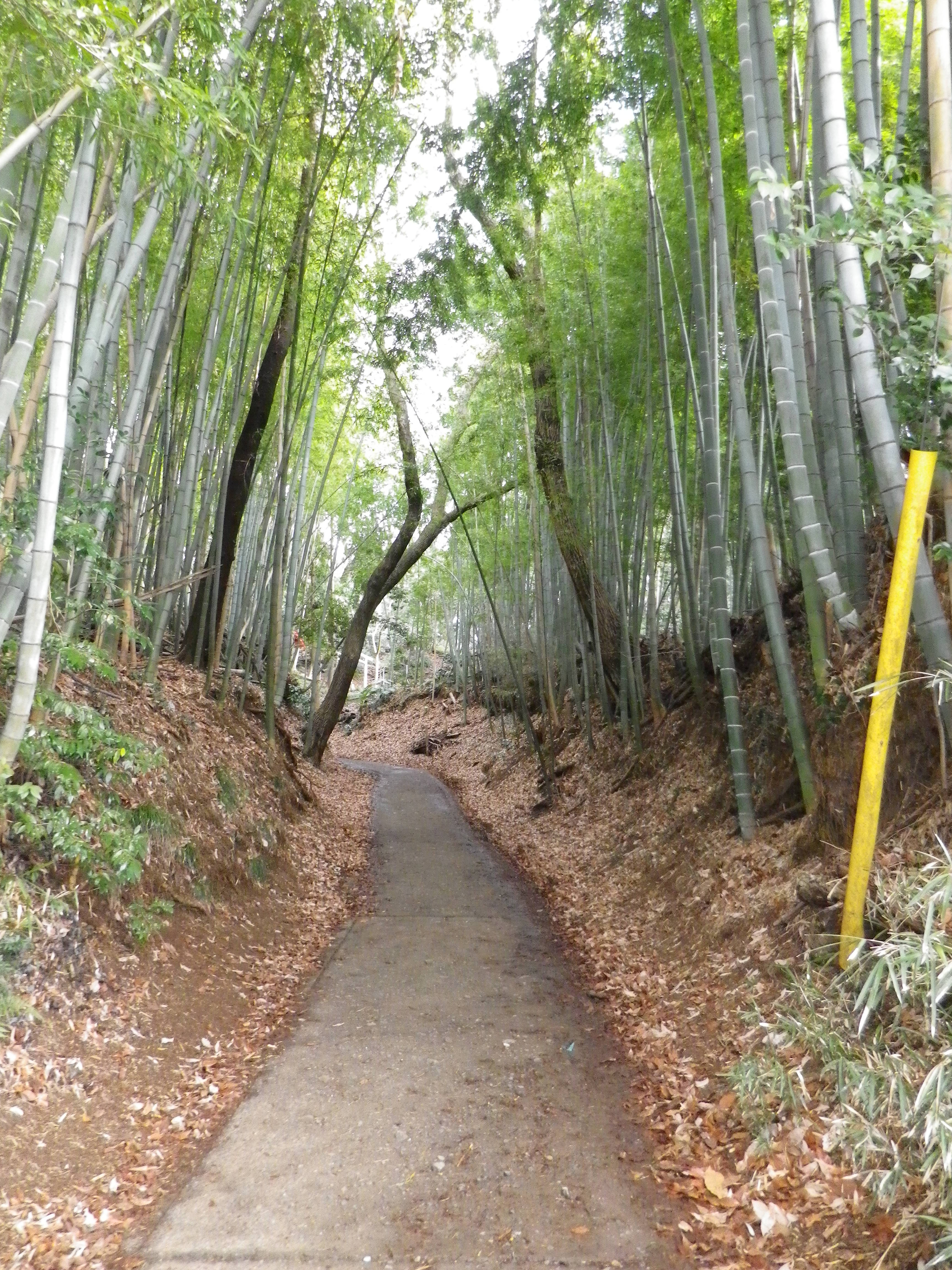 滝山城大手口